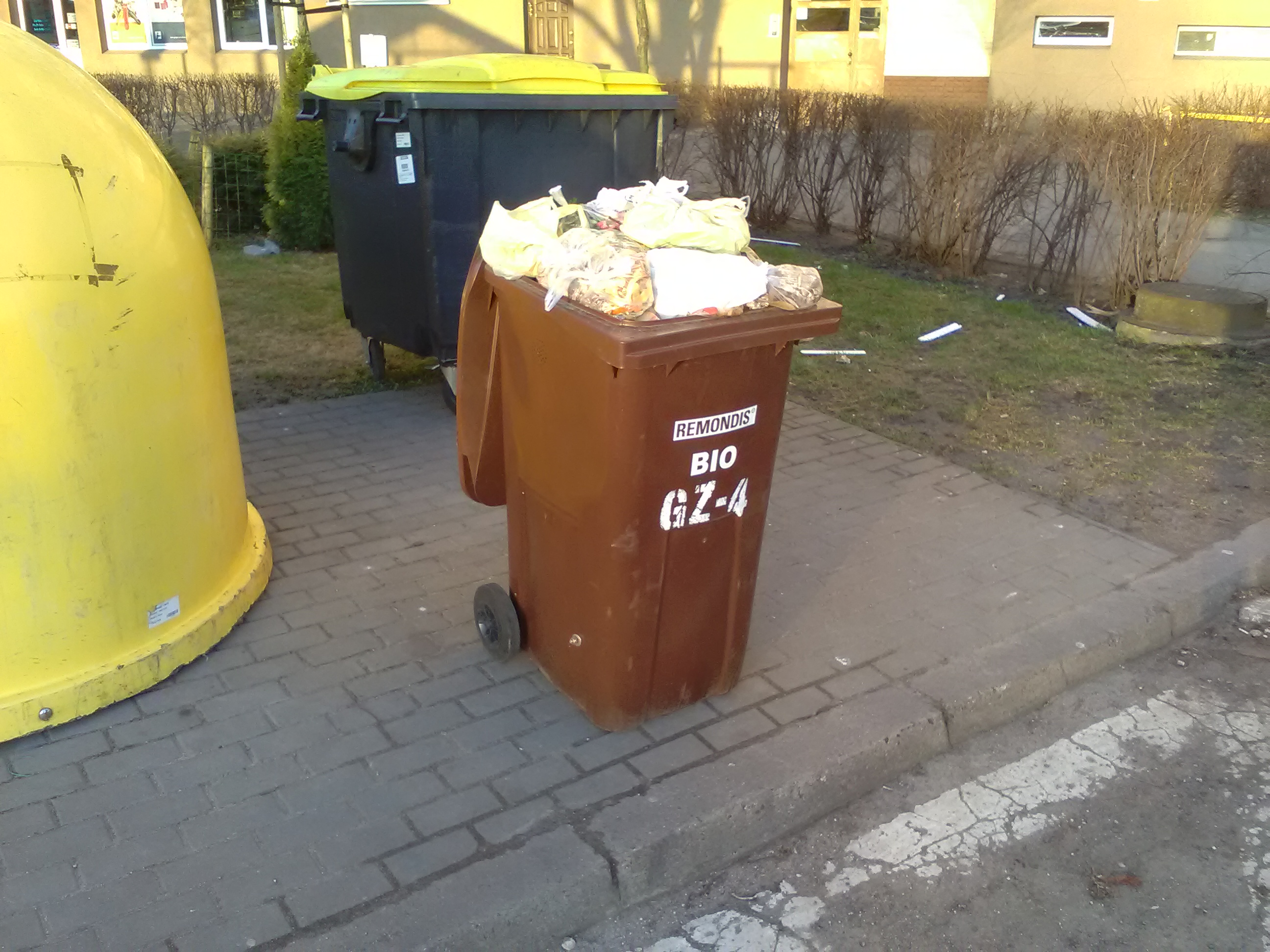 Przepełniony pojemnik do segregacji śmieci na osiedlu Bohaterów II Wojny Światowej w Poznaniu.